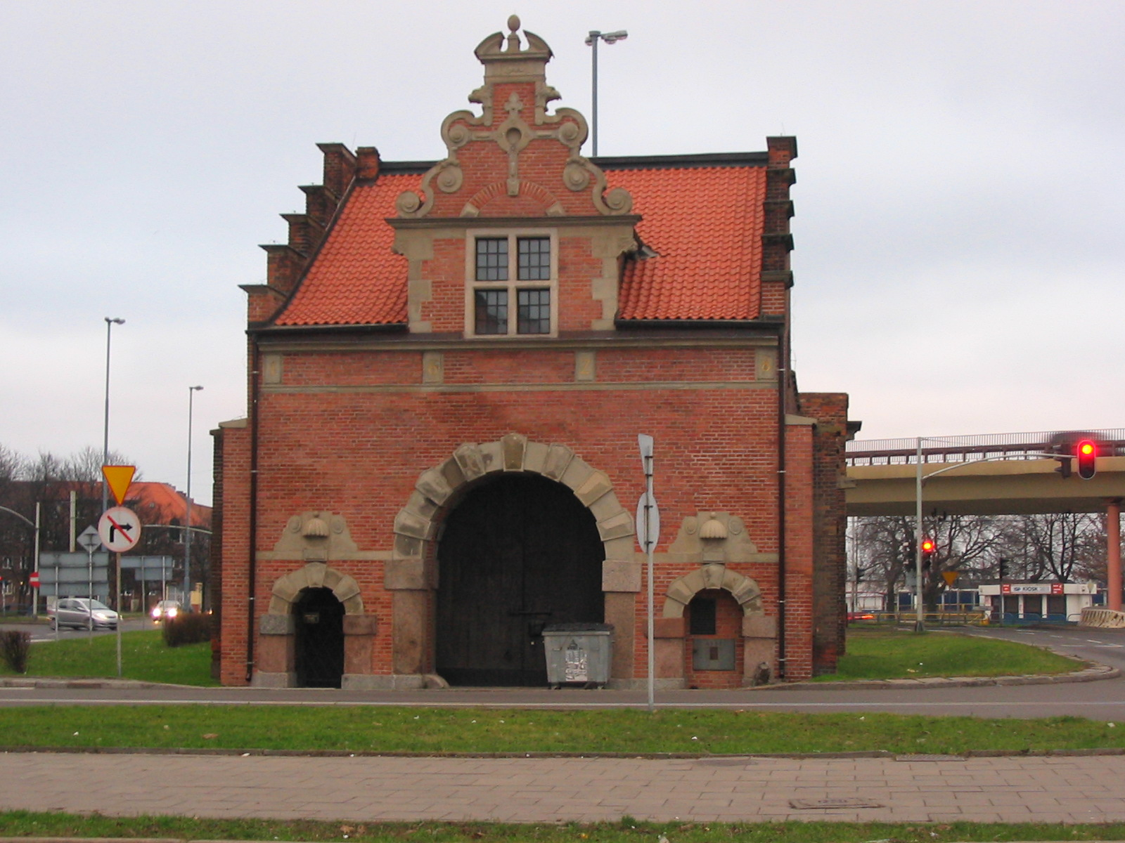 Gdańsk Długie Ogrody, ul. Długie Ogrody - Brama Żuławska (Brama Długich Ogrodów), XVII